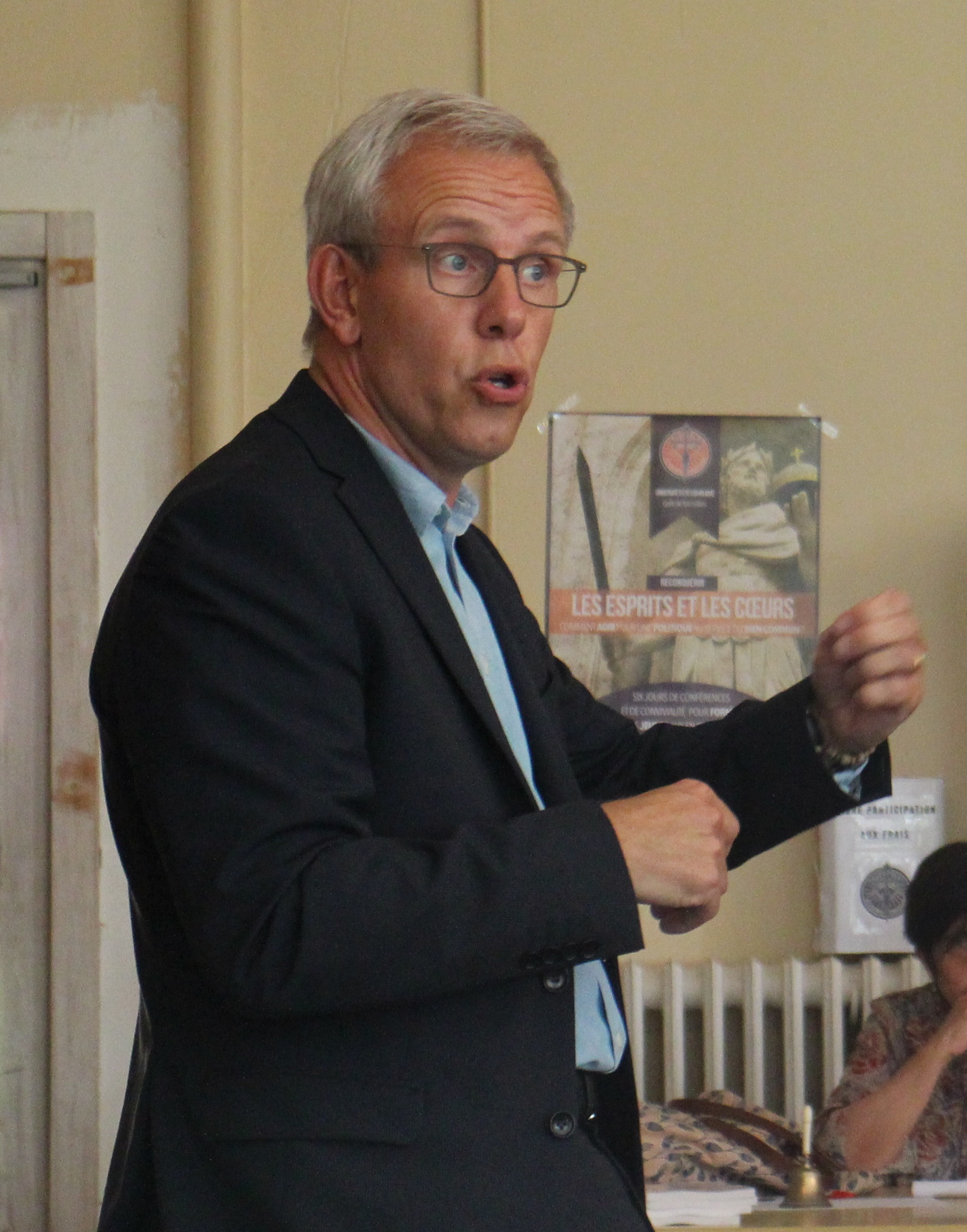 Martial Bild à l'université d'été d'Academia Christiana, en août 2017.